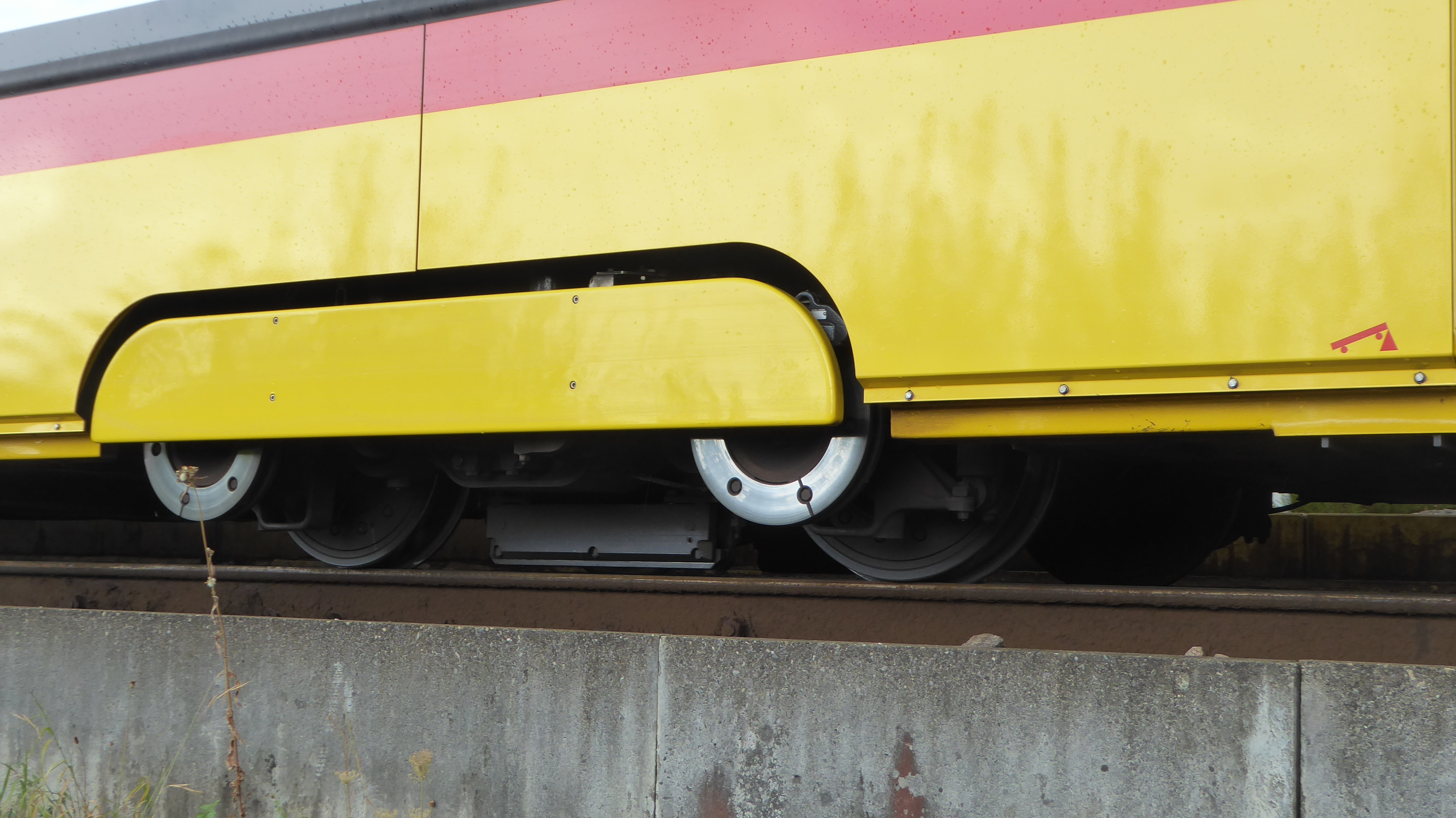 Laufdrehgestell des Tango-Trams Be 6/10 178 der Baselland Transport (BLT)Aufnahmeort: Station Rodersdorf